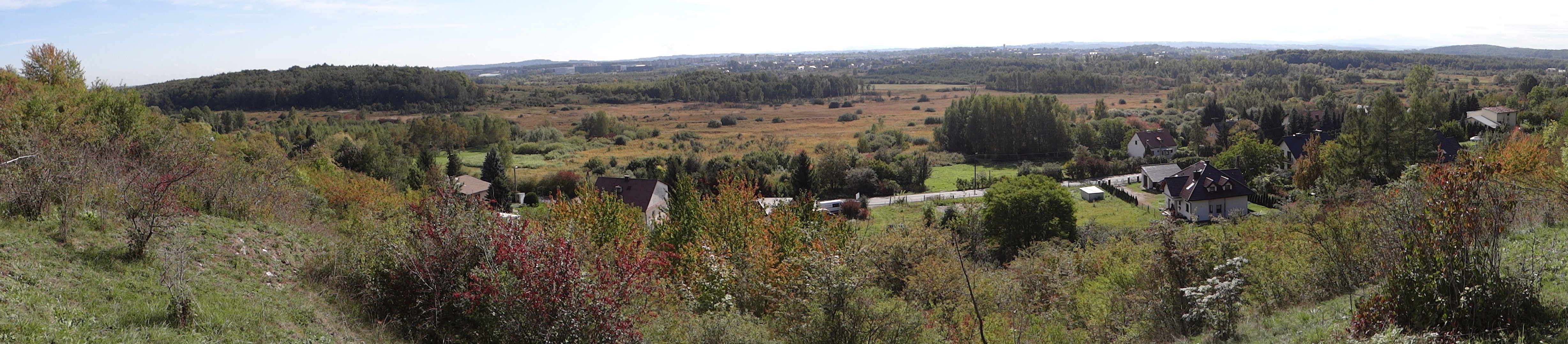 Panorama widokowa z wzgorza Solnik w Krakowie